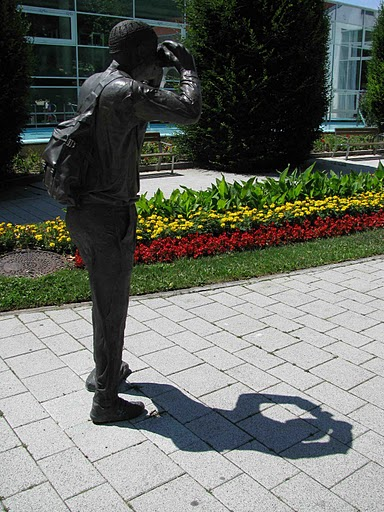 Turisti skulptuur Badeni termide (Römertherme) ees Austrias. Skulptuuri autor teadmata.